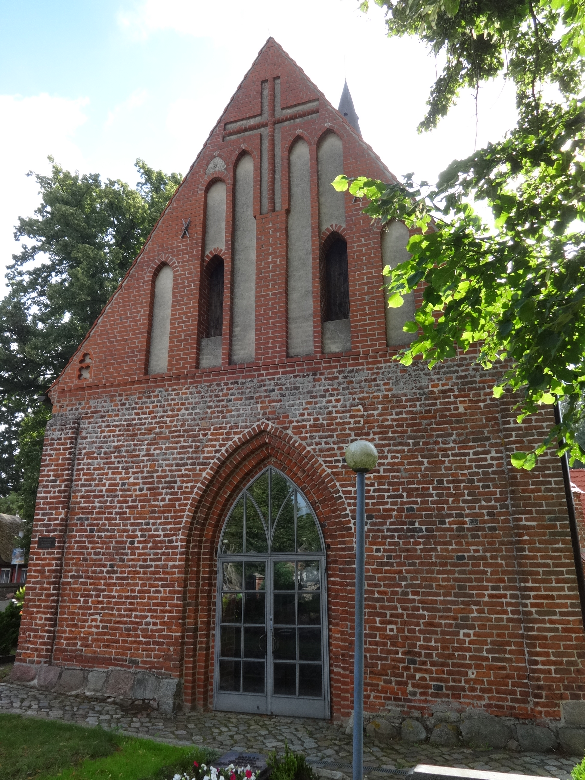 Dorfkirche St. Johannis in Katzow, Landkreis Vorpommern Greifswald, Mecklenburg-Vorpommern